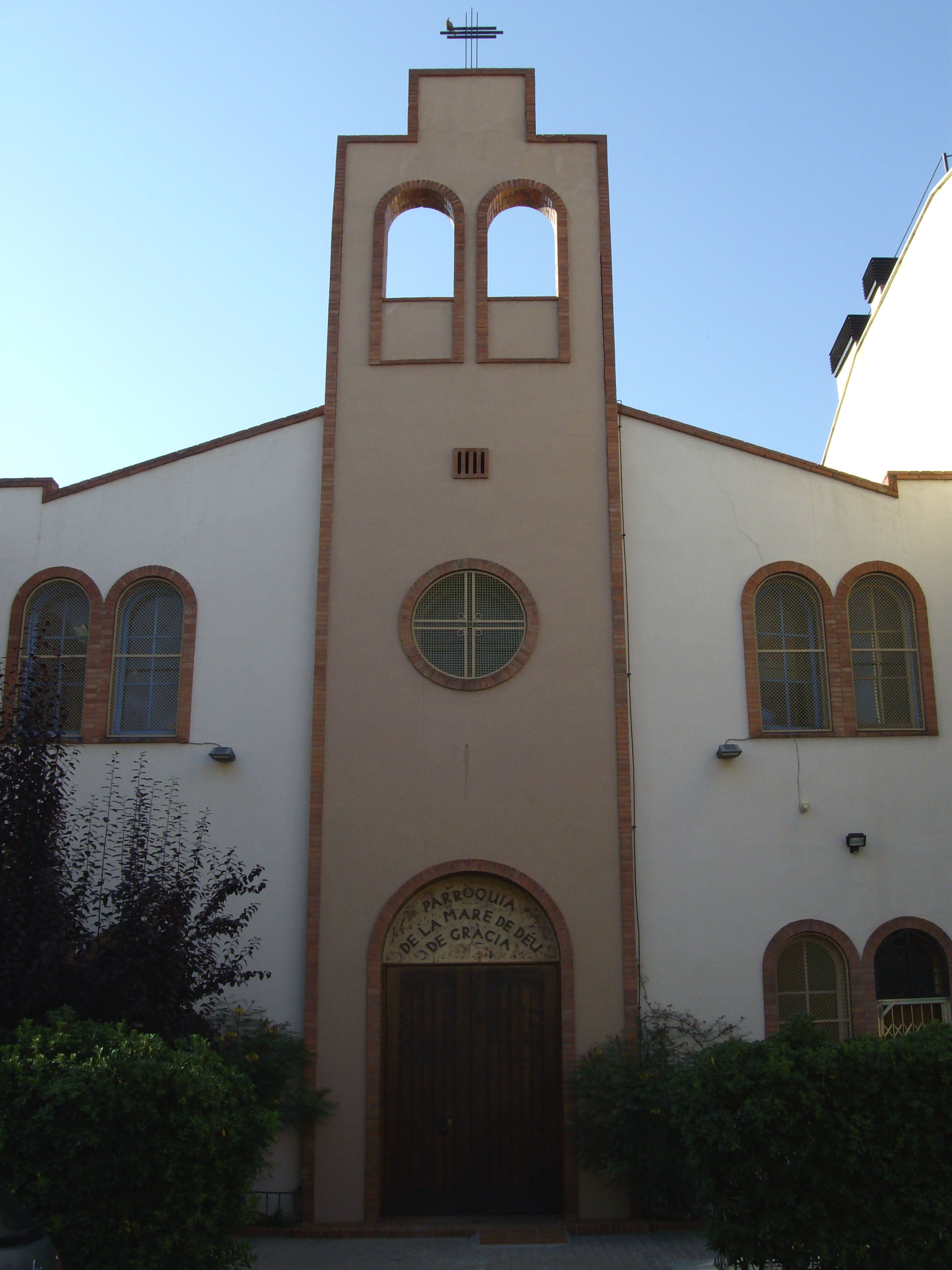 Iglesia de la Mare de Déu de Gràcia, situada en la calle Fiveller, 84, en el barrio de Gràcia, en Sabadell, Barcelona (España).